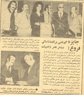 دریافت جایزه شاعر جوان سال 1351